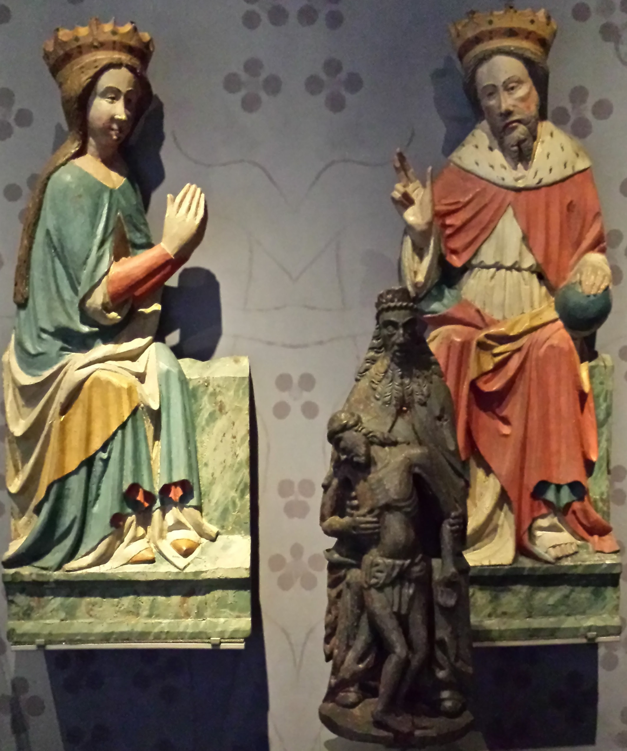 Figurer fra den gamle Essenbæk Kirke, Randers - Maria til venstre, Kristus til højre, og "Nådesstolen" forrest.